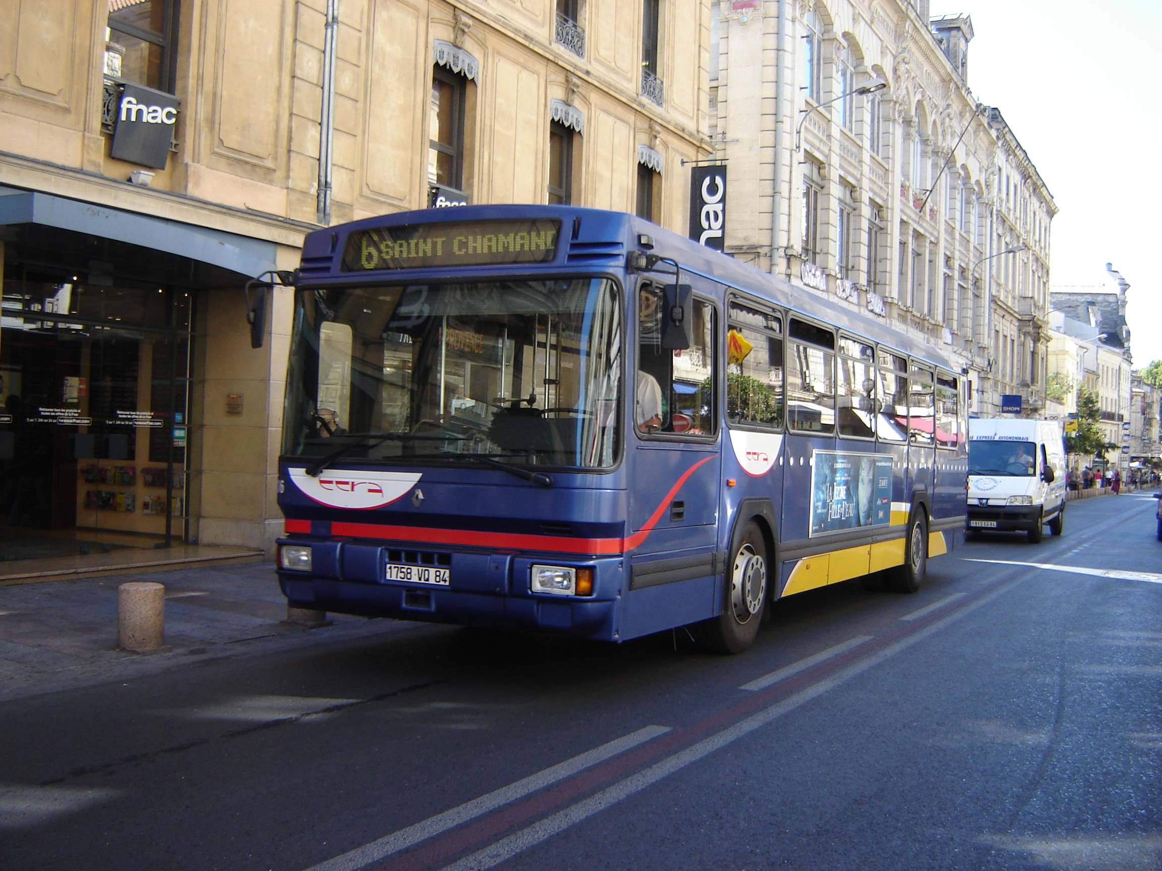 Un Renault PR 112 du réseau TCRA d'Avignon